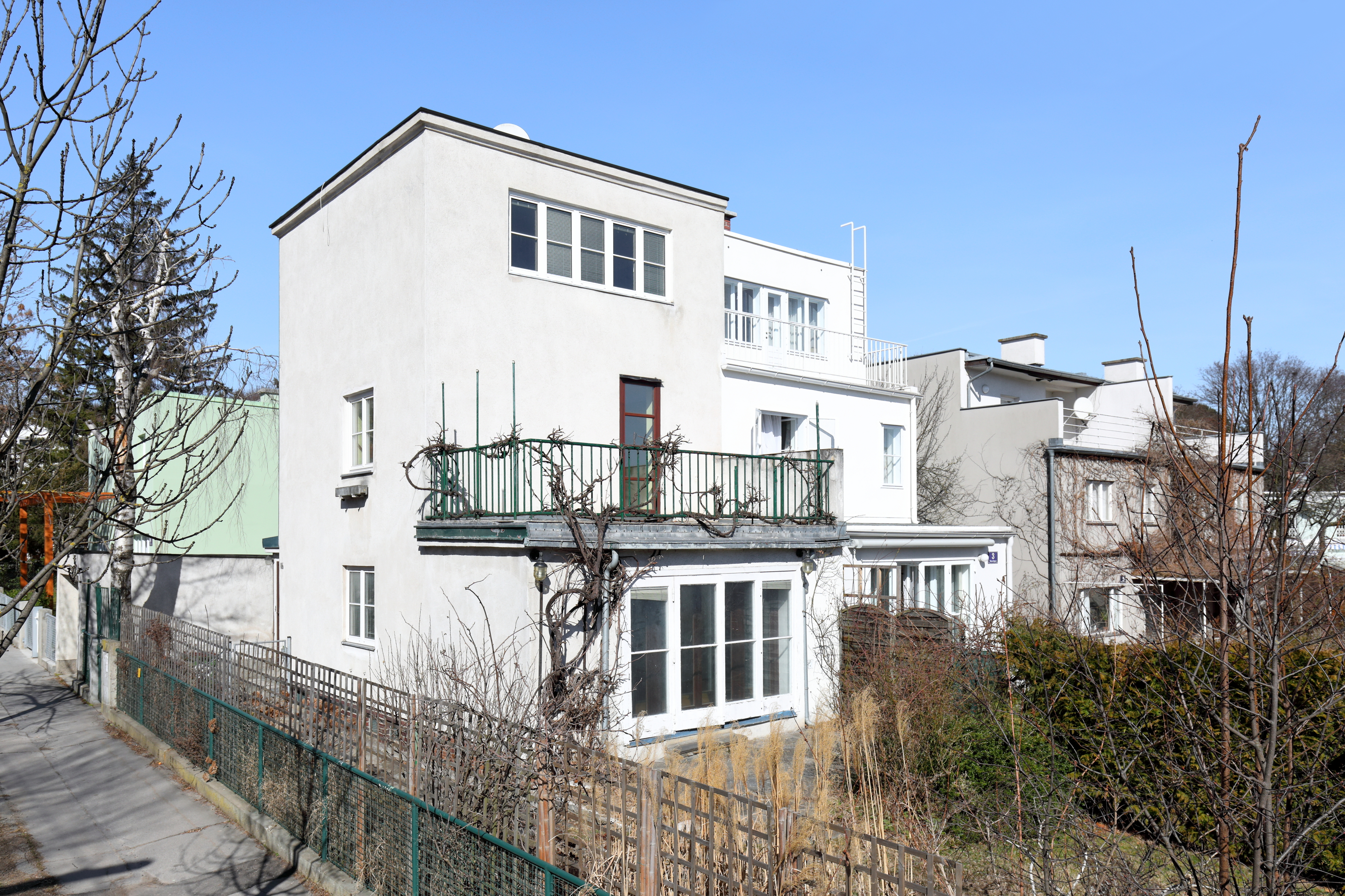 Das Doppelwohnhaus Woinovichgasse 1, 3 der Werkbundsiedlung Wien im 13. Wiener Gemeindebezirk Hietzing.Errichtet wurden das Doppelwohnhaus um 1930 nach Plänen des Architekten Hugo Gorge. Es ist ein Teil einer Mustersiedlung von etwa 70 Häusern mit rund 50 verschiedenen Haustypen, die von 1929 bis 1932 gebaut wurde. An der Planung der einzelnen Häuser beteiligten sich über 30 Architekten. This media shows the Vienna residential building (Gemeindebau) with the ID 61.